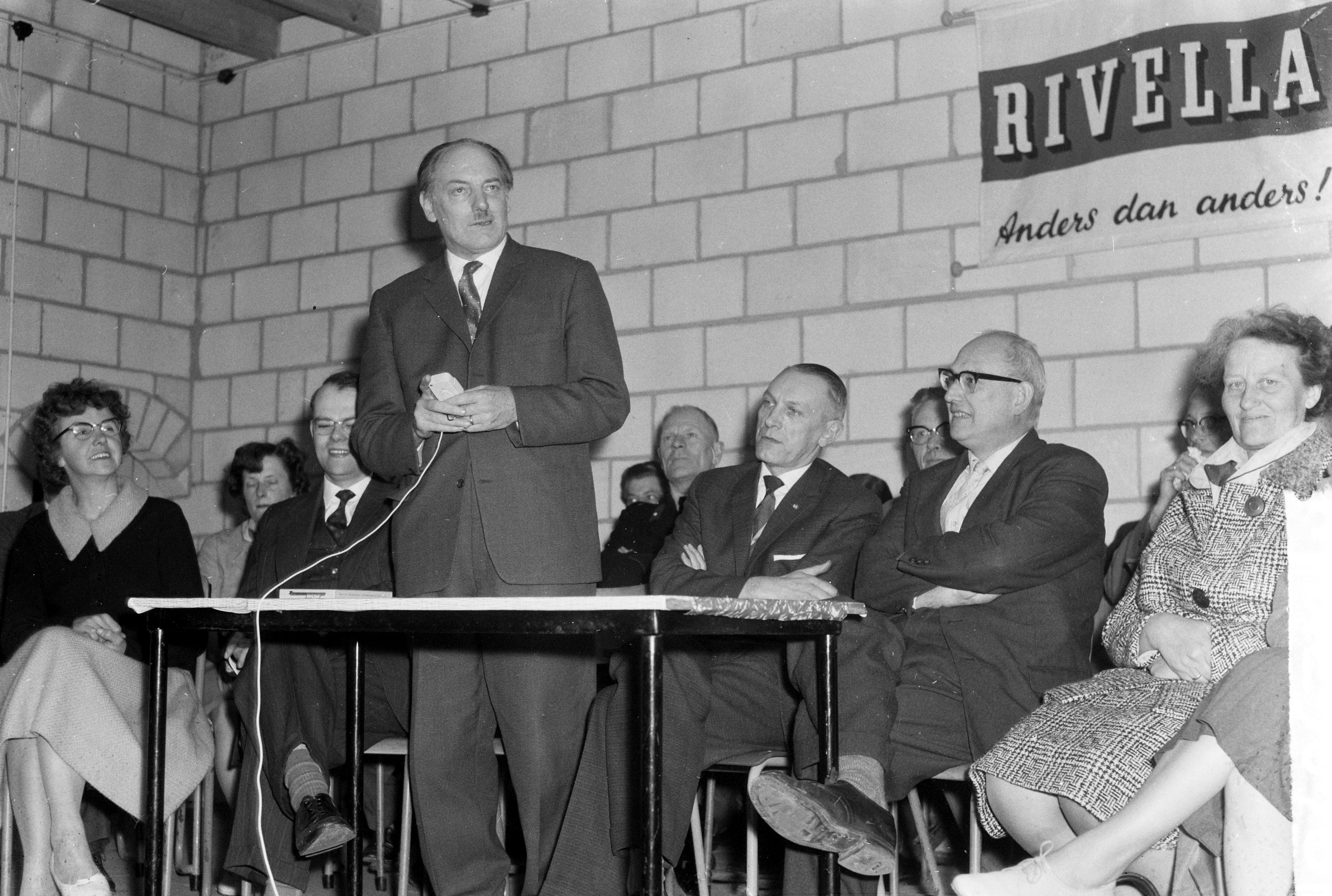 Jeugdschaaktoernooi te Dwingeloo. Rede voorzitter Schaakbond (=Henk van Steenis), 5 april 1961